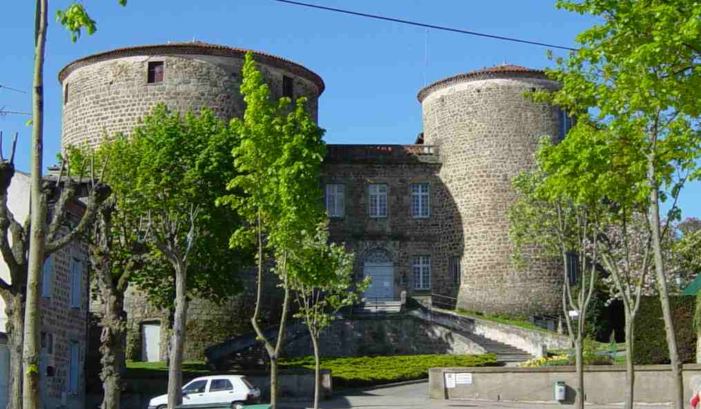 Château des Évêques-du-Puy, à Monistrol-sur-Loire (Haute-Loire, France) .